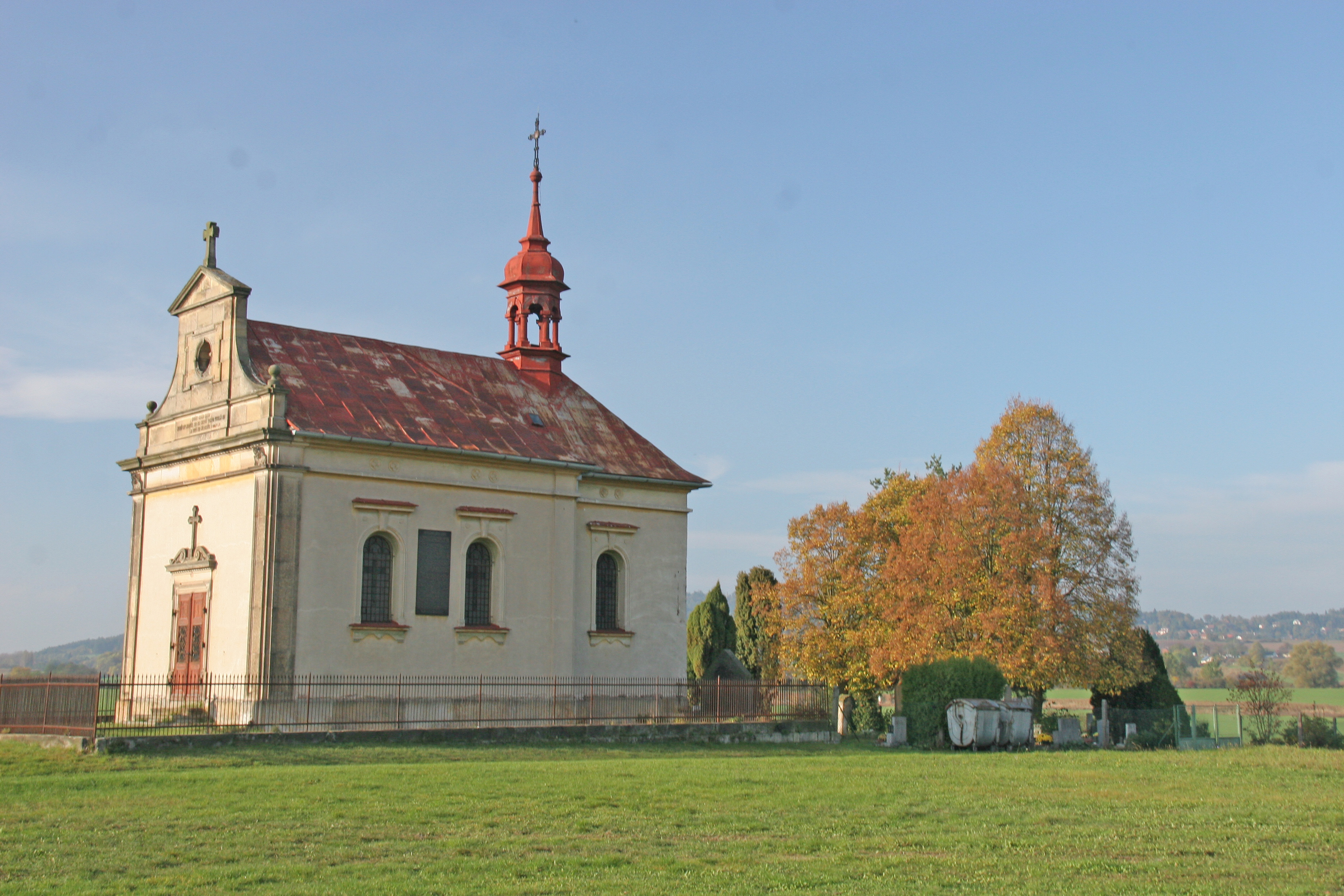 Březina kostel